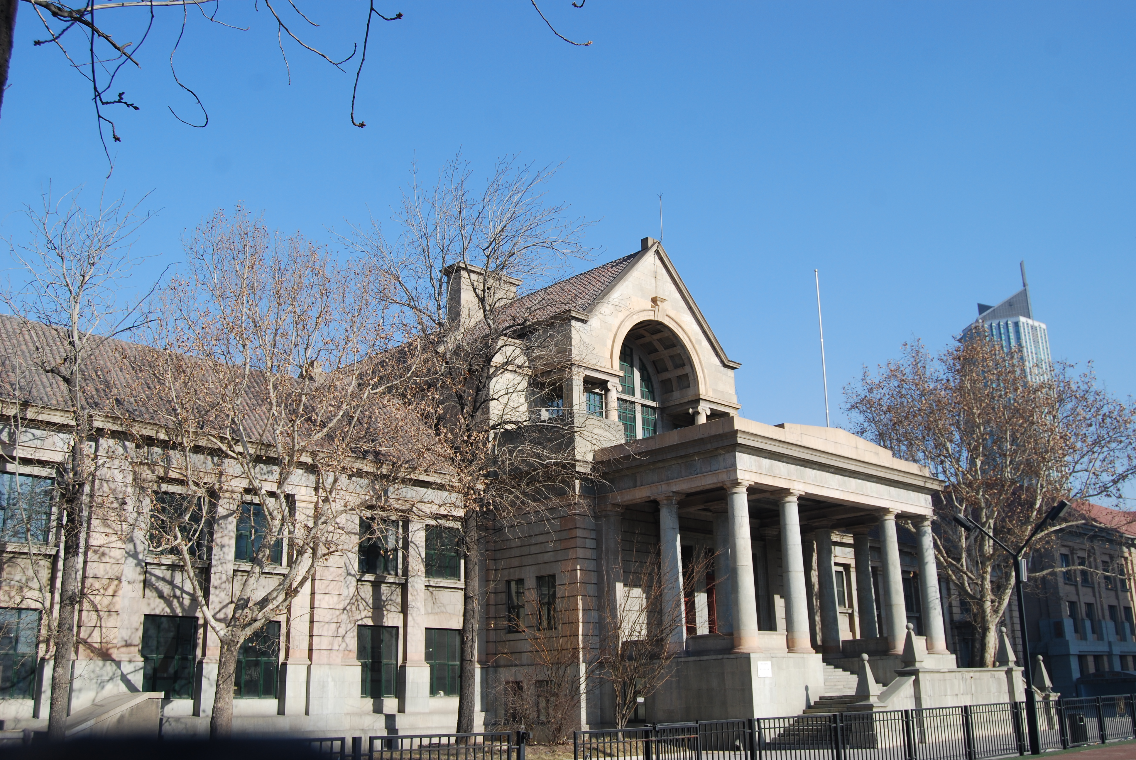 天津市历史风貌建筑